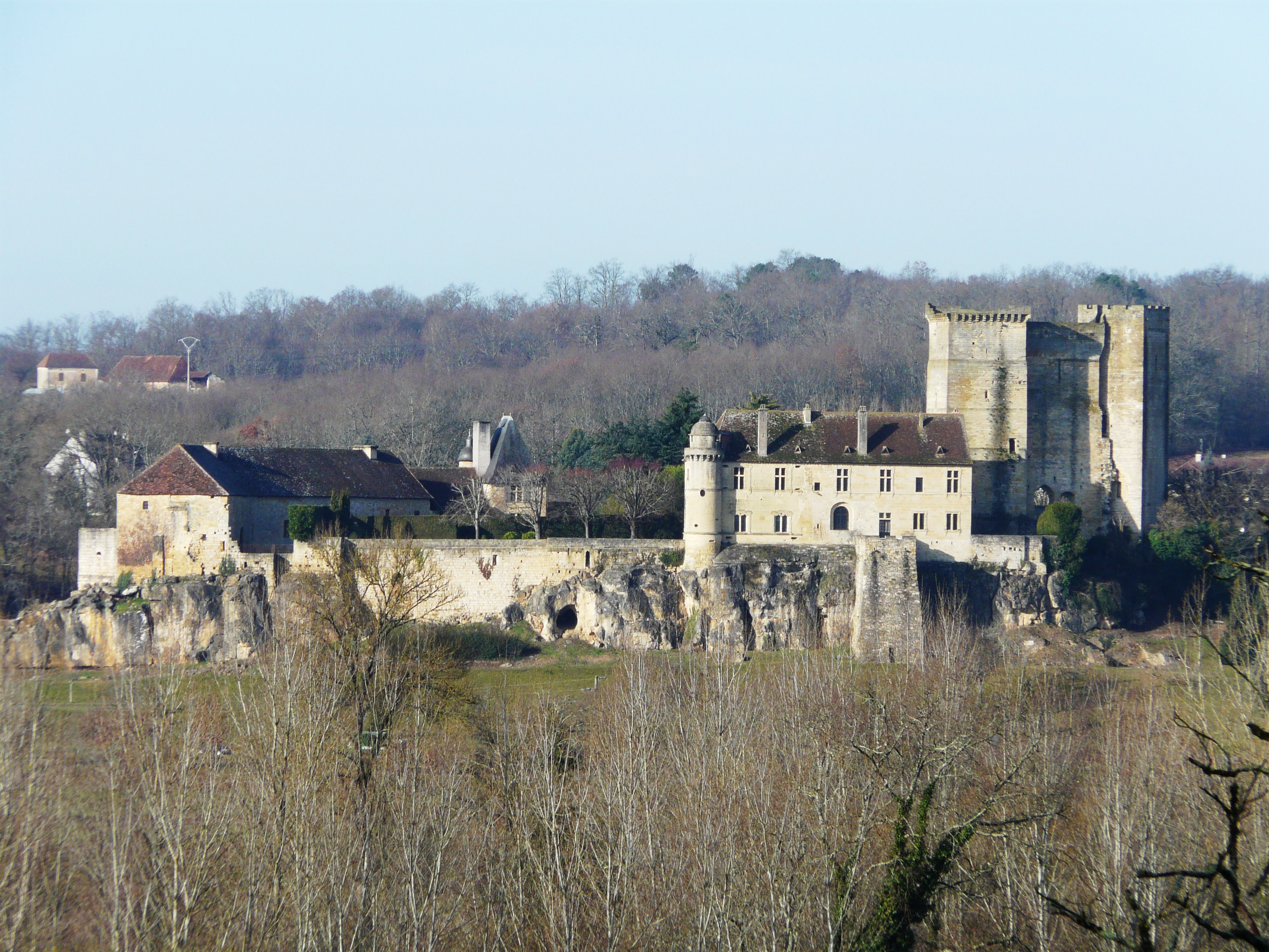 Le château d'Excideuil vu du sud-est, depuis les Roches enchantées, Dordogne, France.